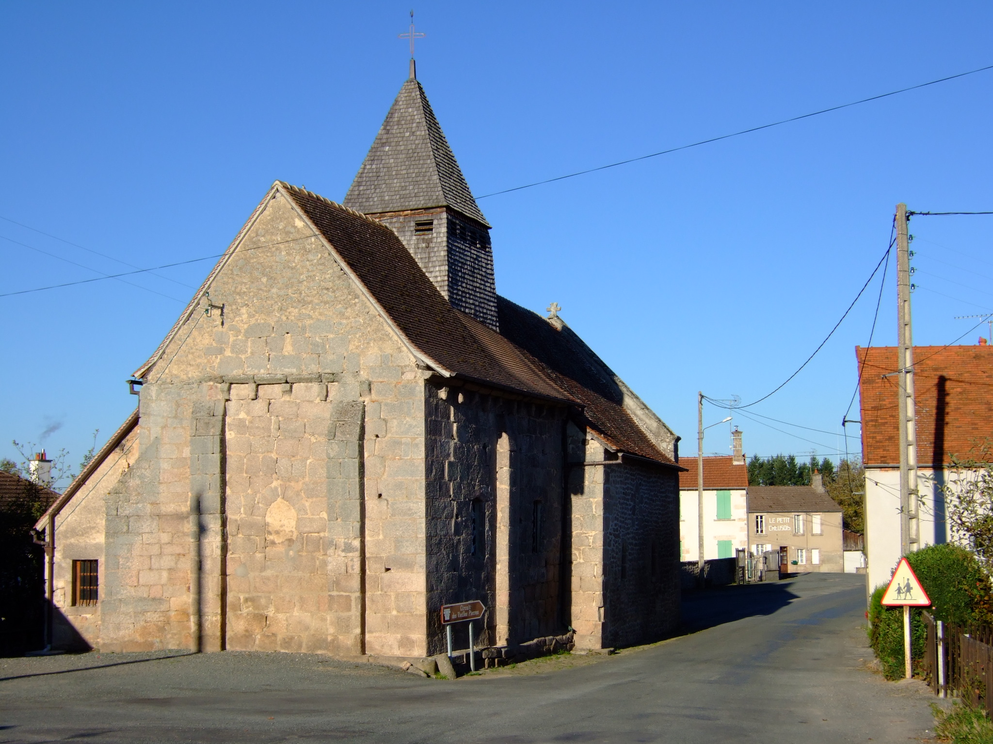 Le village de Saint-Sylvain-Bas-le-Roc. Photo amateur prise par moi-même